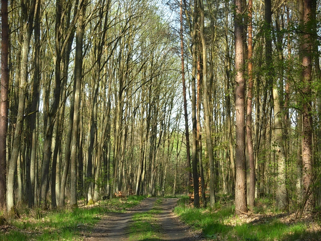 Las Osowa Góra-Czyżkówko w Bydgoszczy